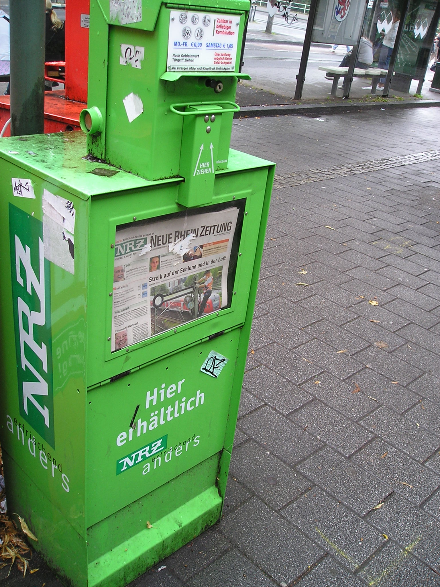 NRZ-Zeitungsautomat in Düsseldorf-Benrath